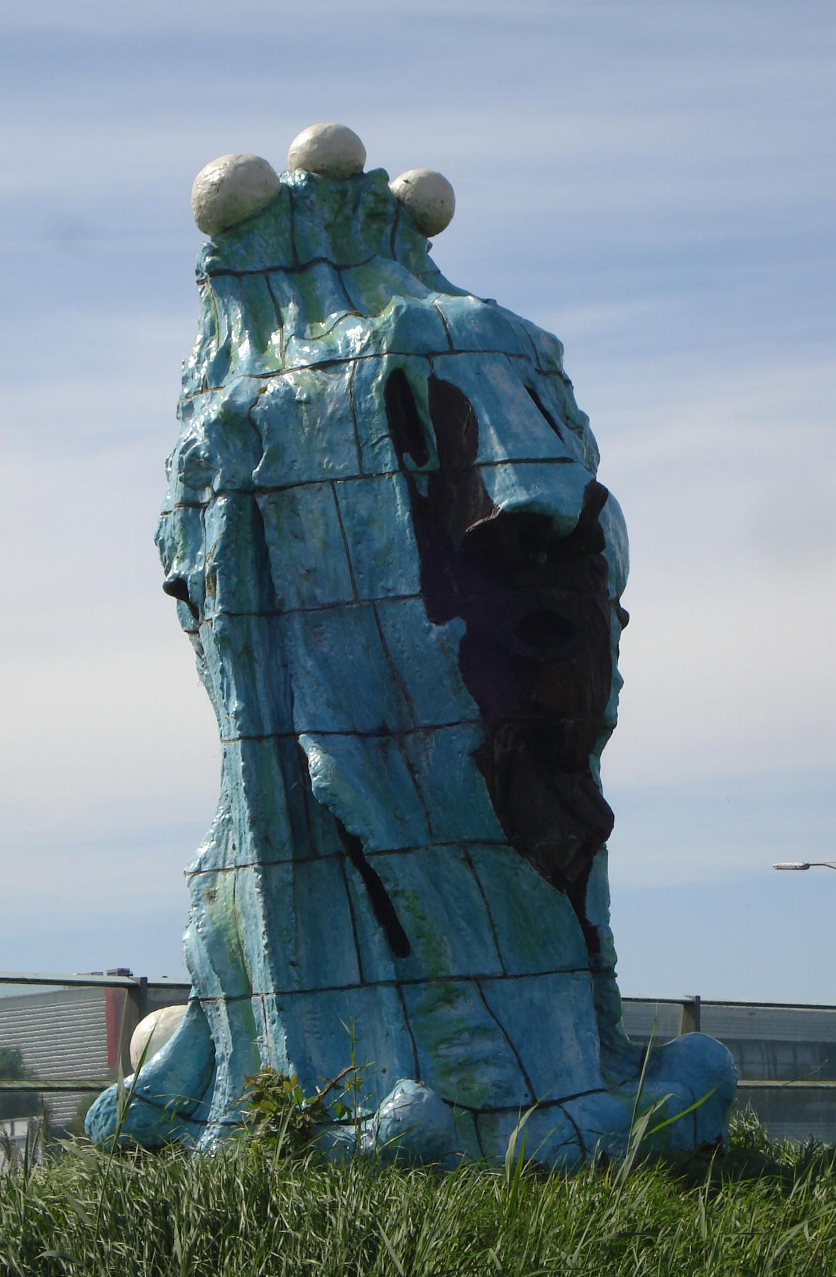 Pijnacker-Delfgauw, Scheepmakersingel t.h. N470. Kunstwerk "Changing the speed" van Adriaan Rees. The Netherlands. FOP.